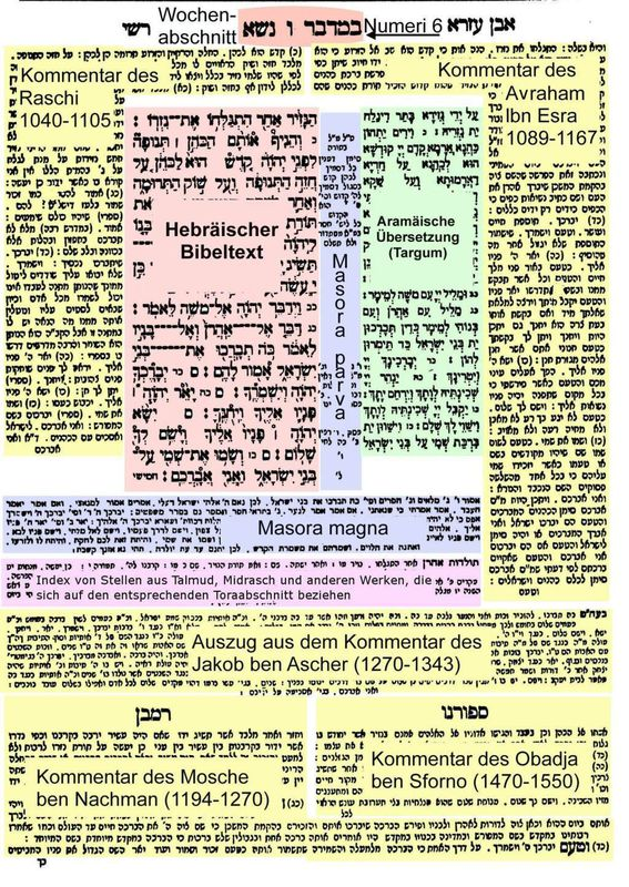 Seite aus Miqraot Gedolot